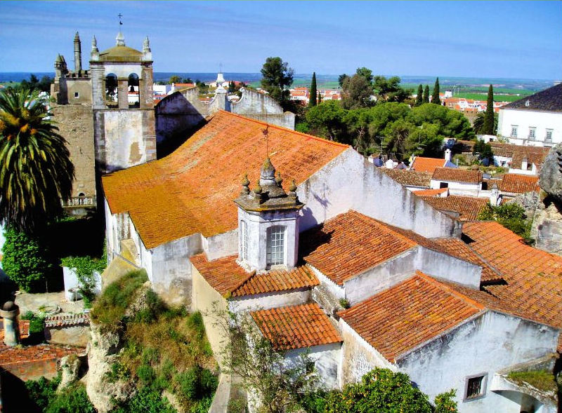 Serpa Vue/View